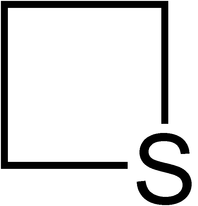 Struktur von Thietan